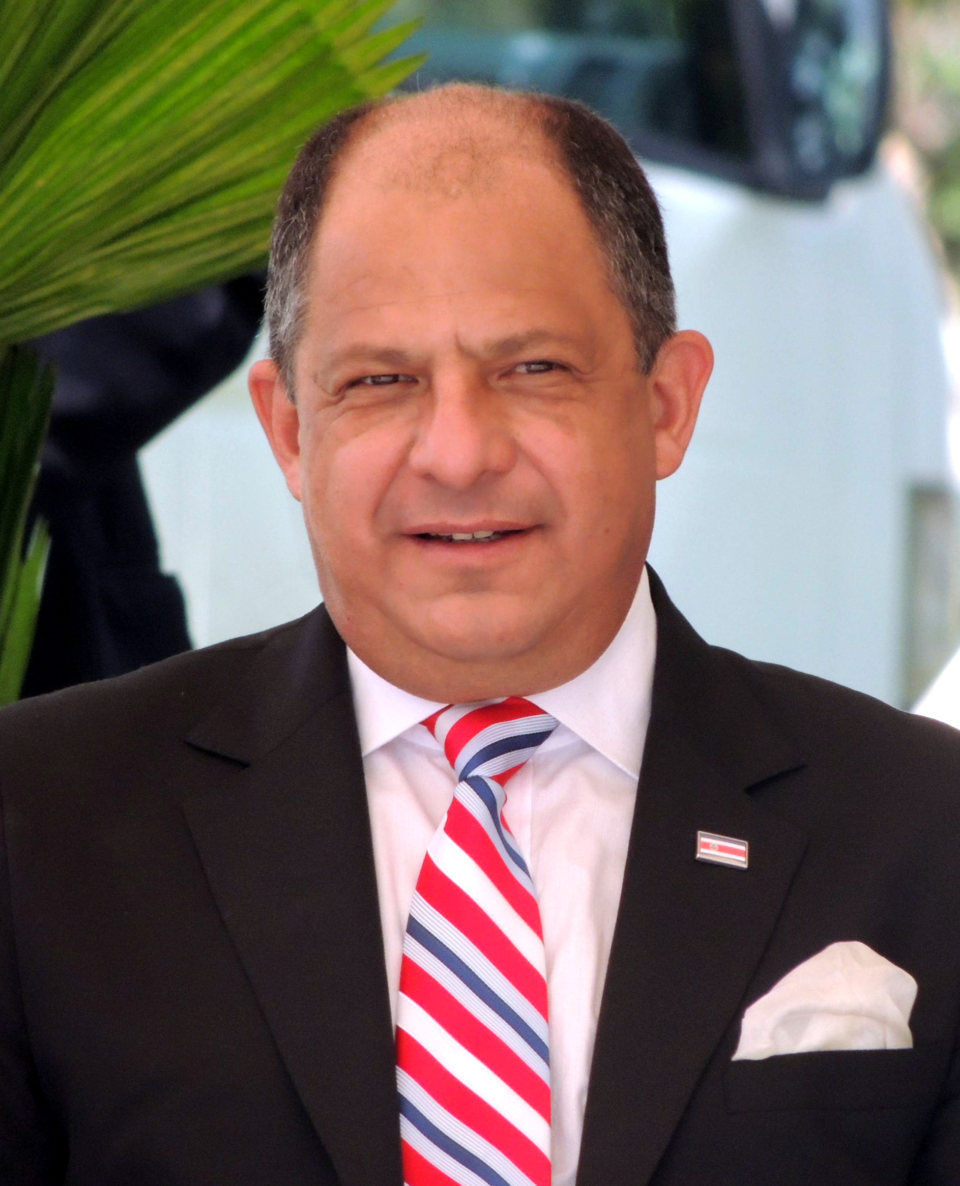 Luis Guillermo Solís - prezydent Kostaryki